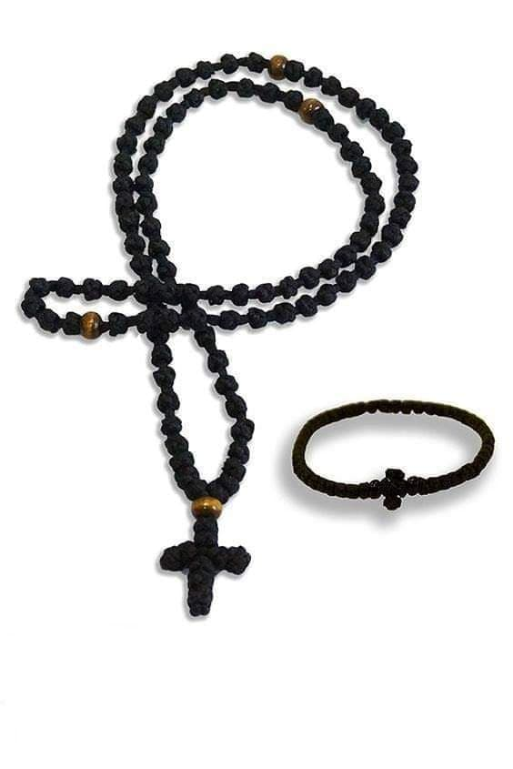 Komboskini në forma e madhësi të ndryshme.